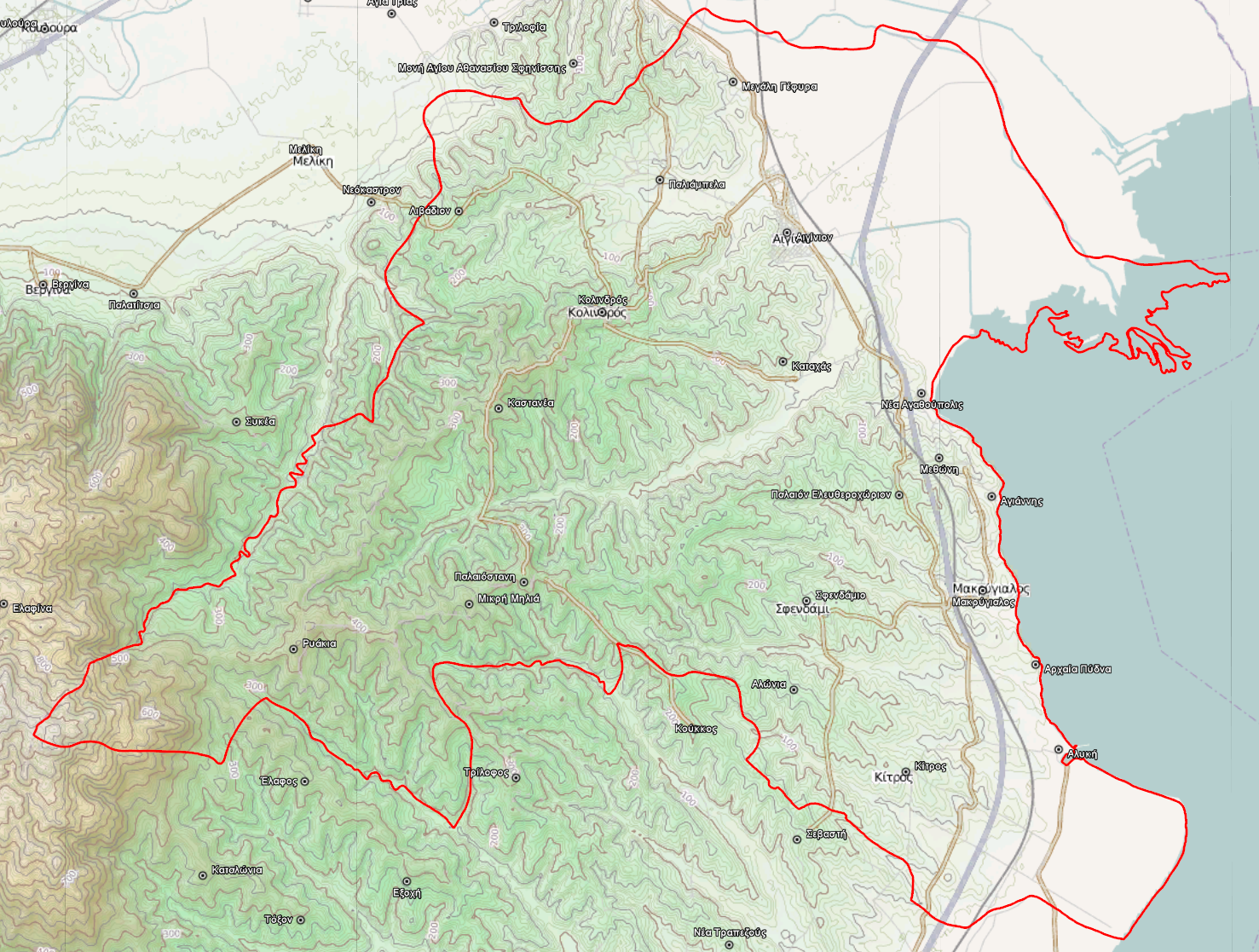 Τοπογραφικός χάρτης του Δήμου Πύδνας-Κολινδρού